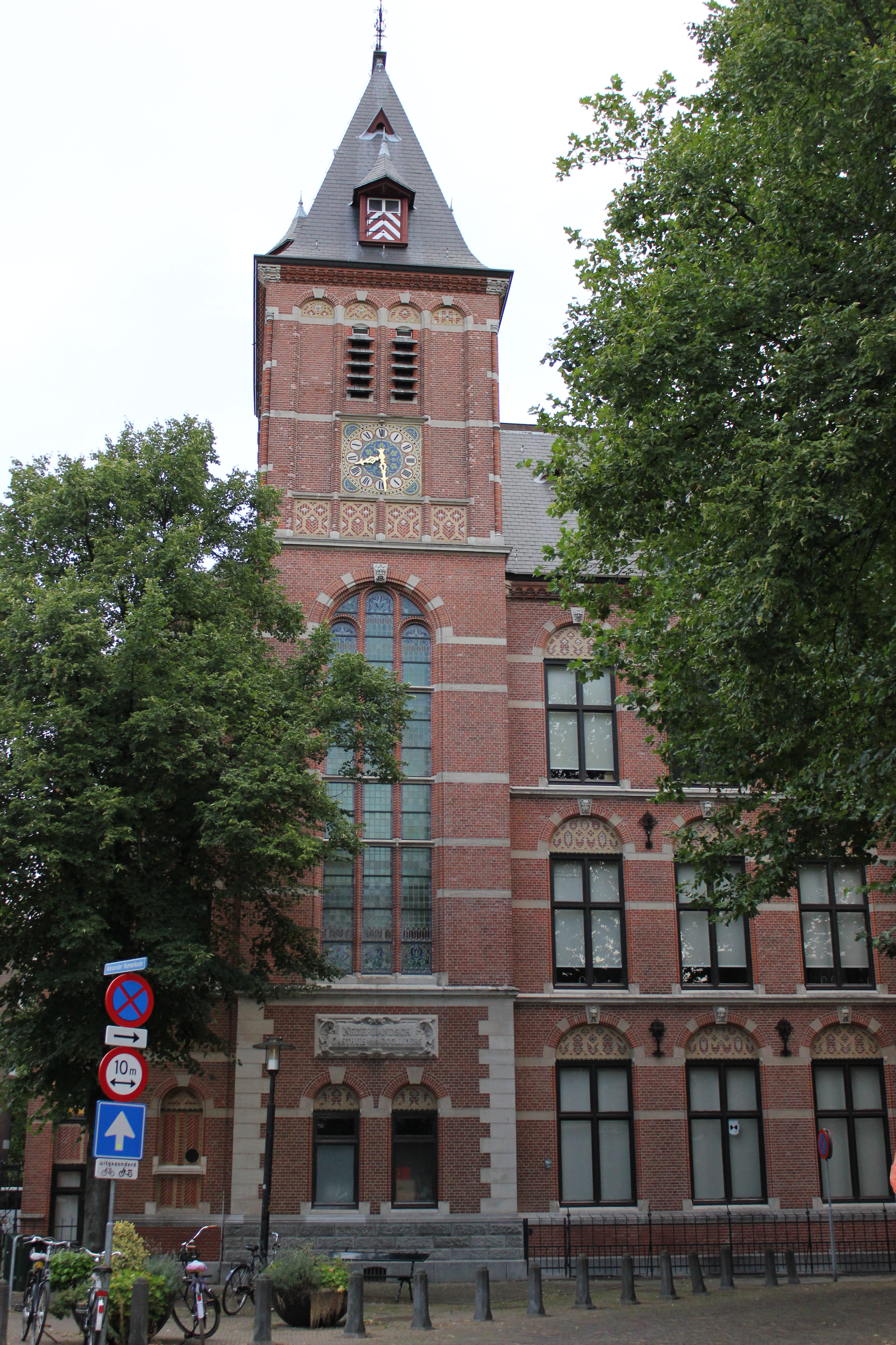 Ooglijdersgasthuis te Utrecht, rijksmonument F.C. Dondersstraat 65 in Utrecht